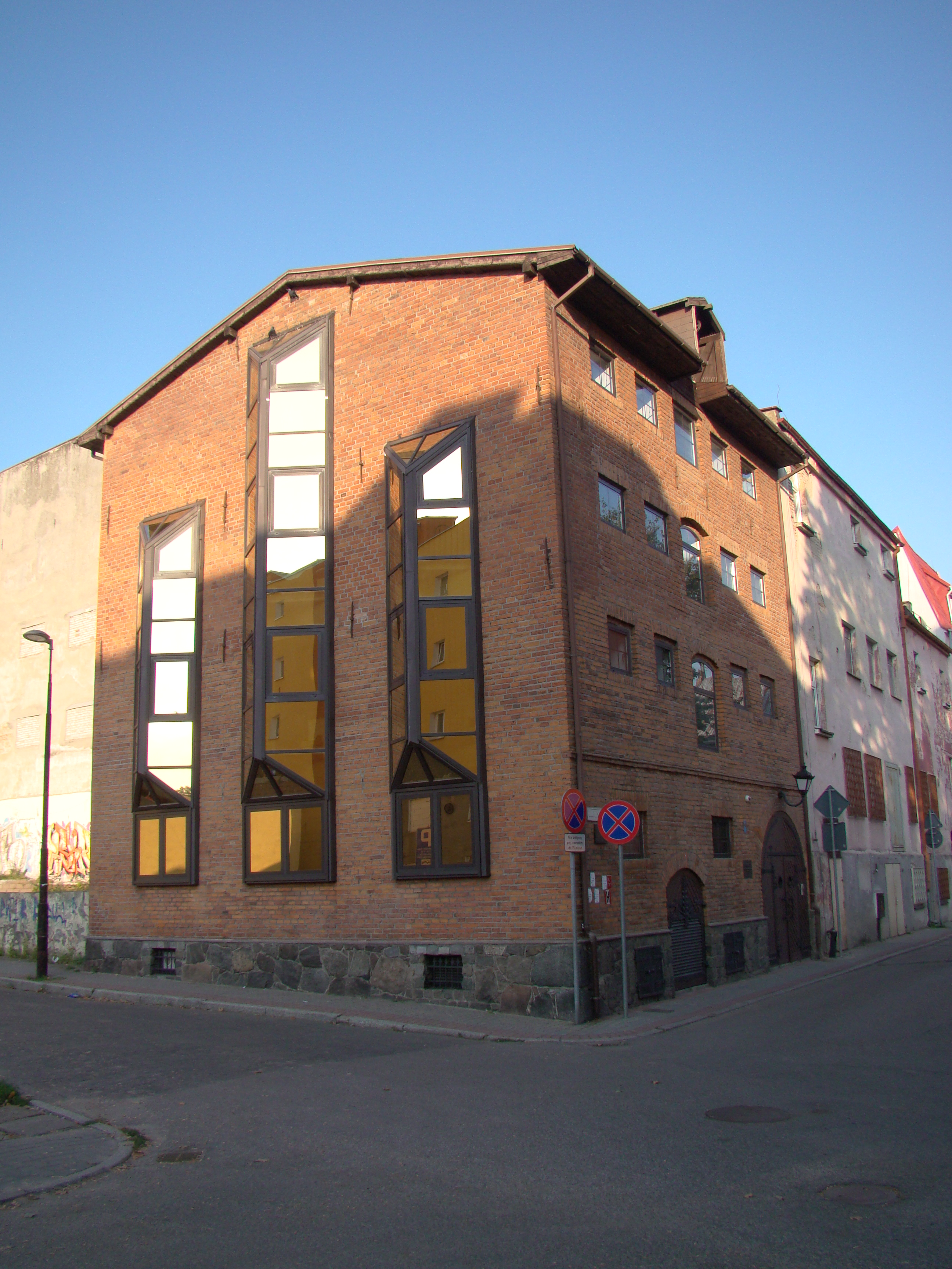 Szczecinek, ul. Junacka 7 (róg ul. Drzymały) - spichlerz, poł. XIX